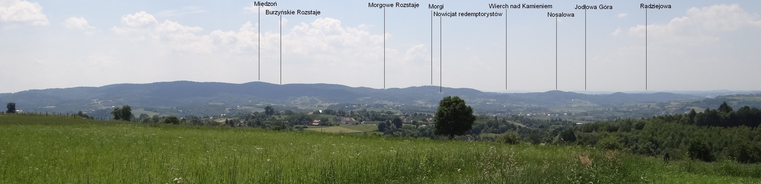 Widok z wzgórz nad Tuchowem (z okolicy cmentarza wojennego nr 163)